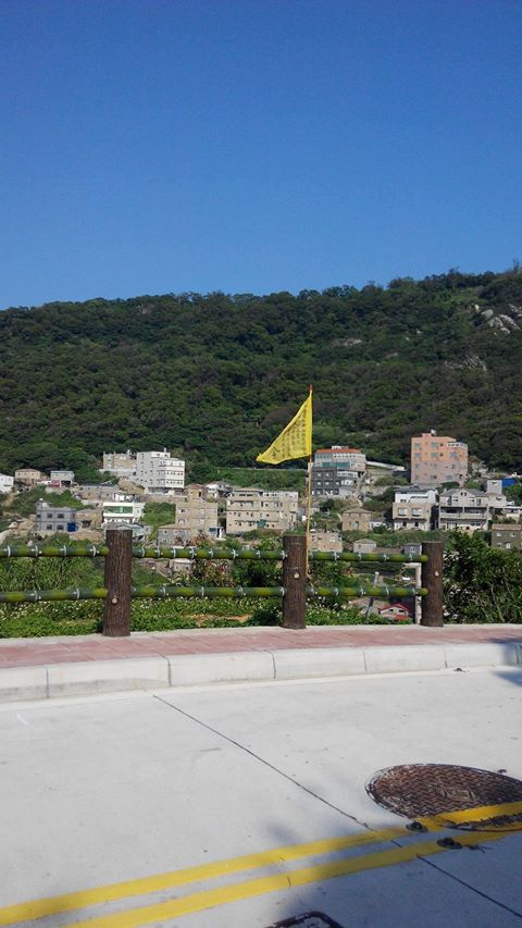 南竿牛峰境在村境安插補庫旗